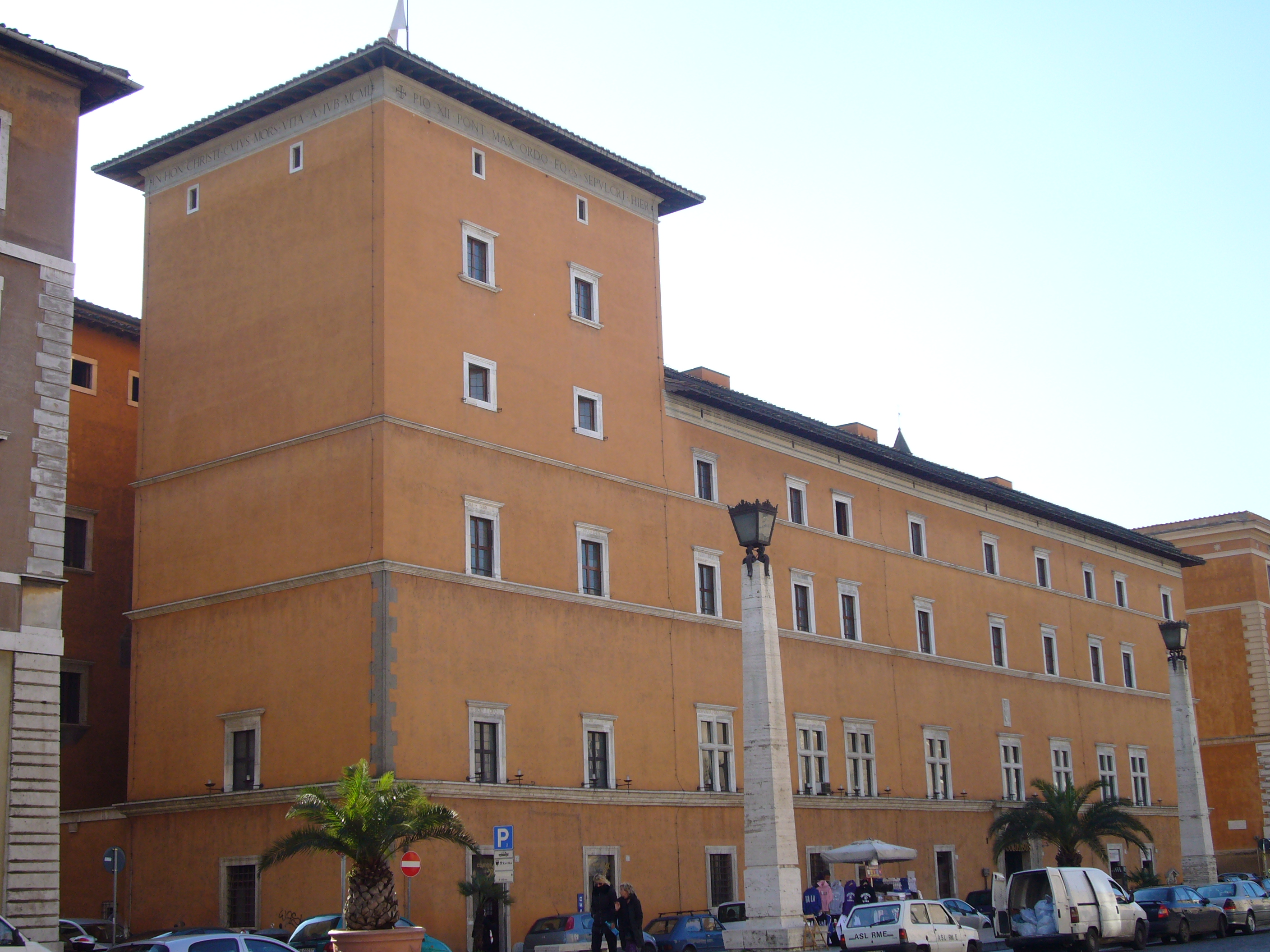 Roma, palazzo dei Penitenzieri a via della Conciliazione (1480, già Della Rovere, architetto Baccio Pontelli)